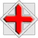 Creu de Sant Jordi de La Generalitat